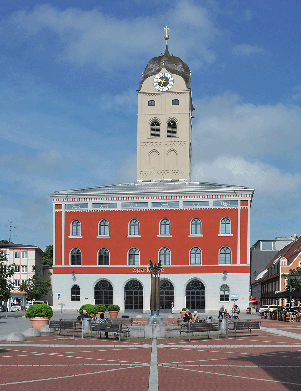 Die Geschäftsstelle der Sparkasse Erding - Dorfen am Schrannenplatz in Erding.